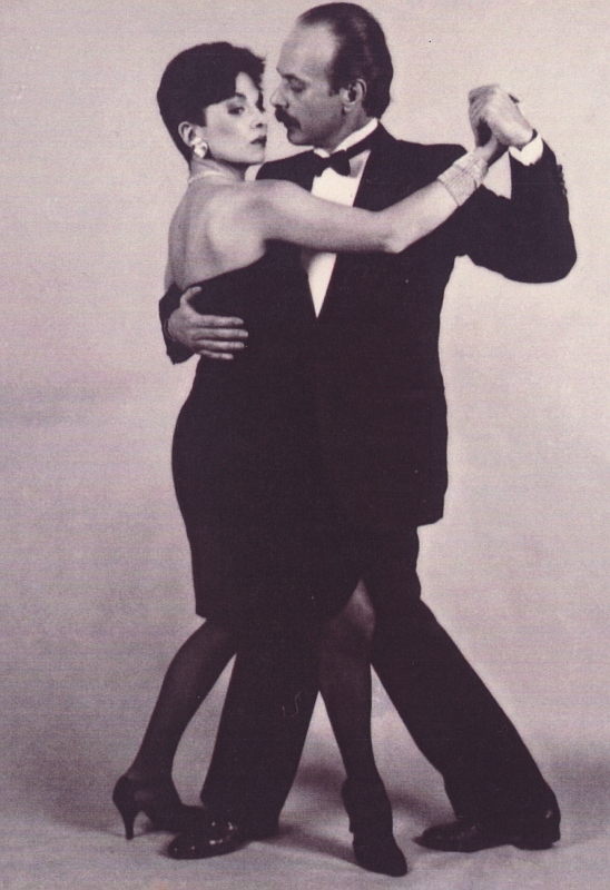 Los Dinzel, foto que fuera fuente del logo de todos sus emprendimientos.